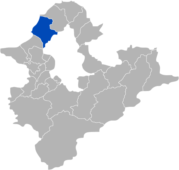 台灣省台北縣淡水鎮 KaurJmeb於2005年2月6日為編寫台北縣zh:淡水鎮所繪